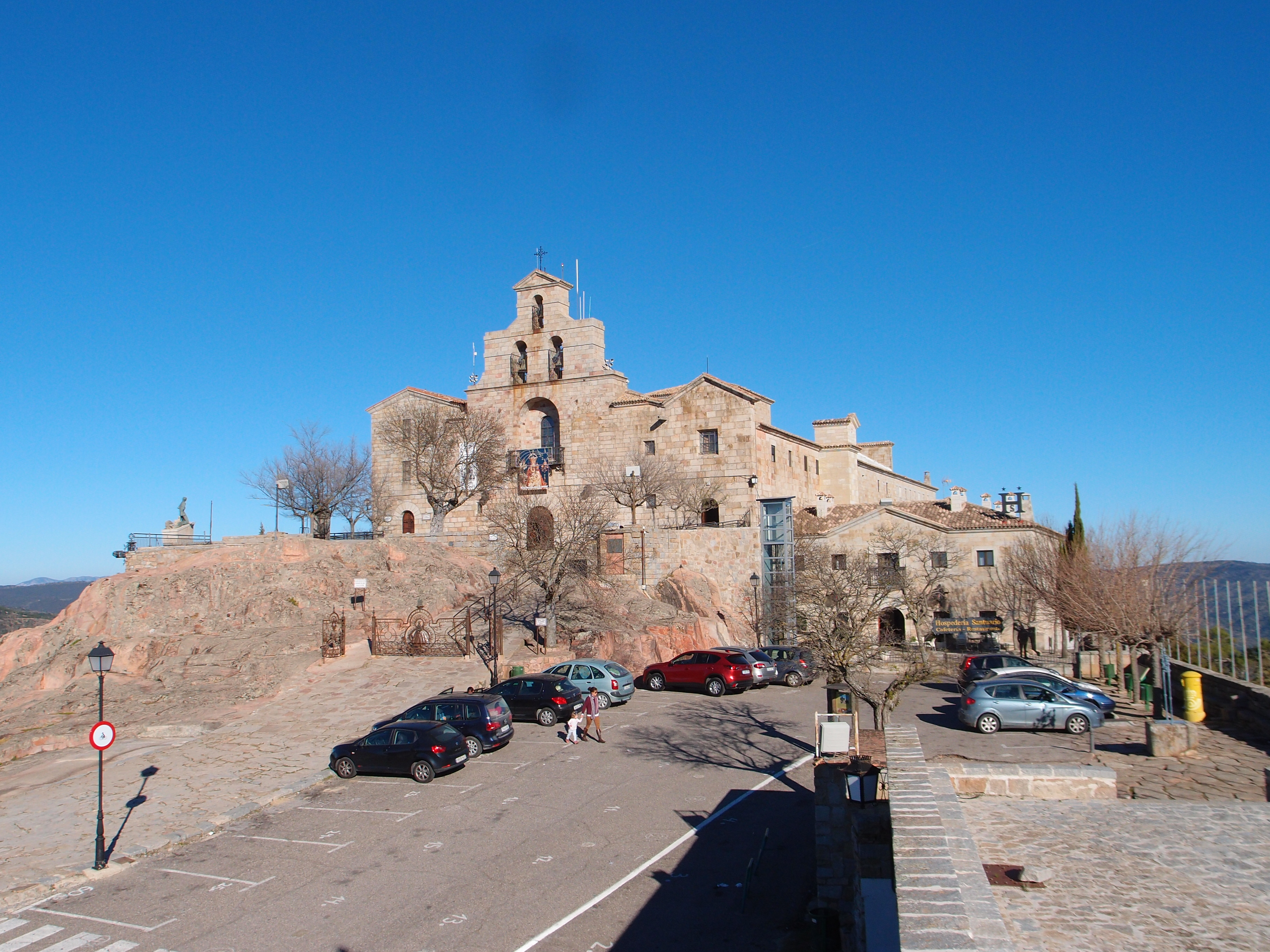 Basílica y Real Santuario de Nuestra Señora de la Cabeza.